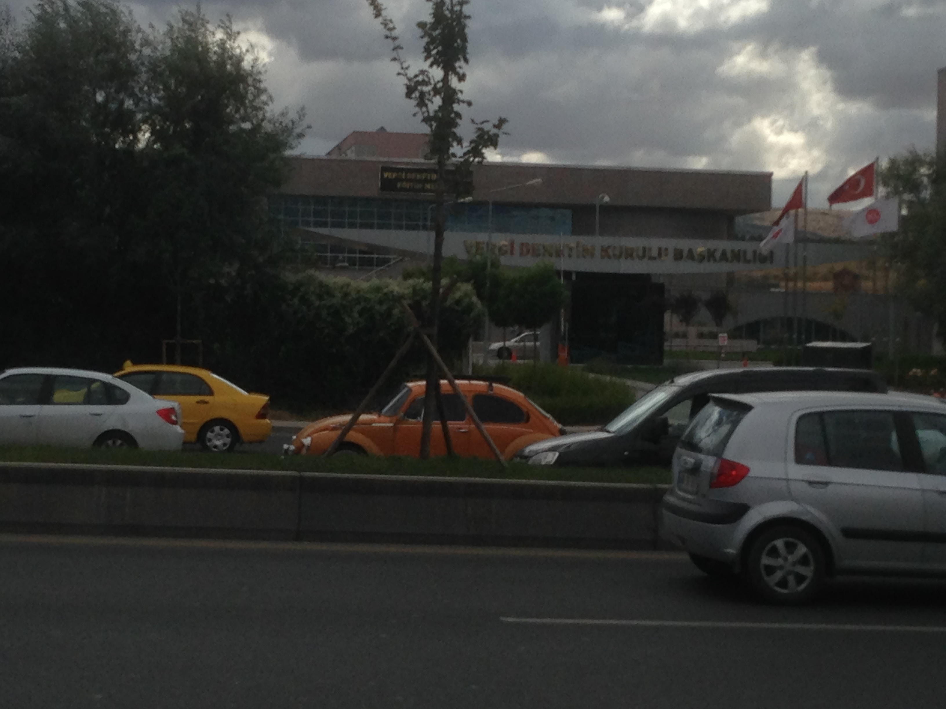 Türkiye Vergi Denetim Kurulu Başkanlığı Binası, Ankara